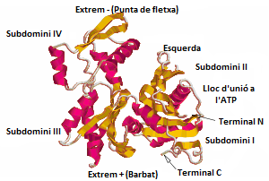 Model molecular de cintes d'actina de múscul esquelètic de conill.